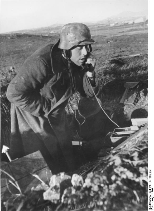 Bild Nr. A 127 032 Bei der deutschen Flakbatterie an der Nettunofront.